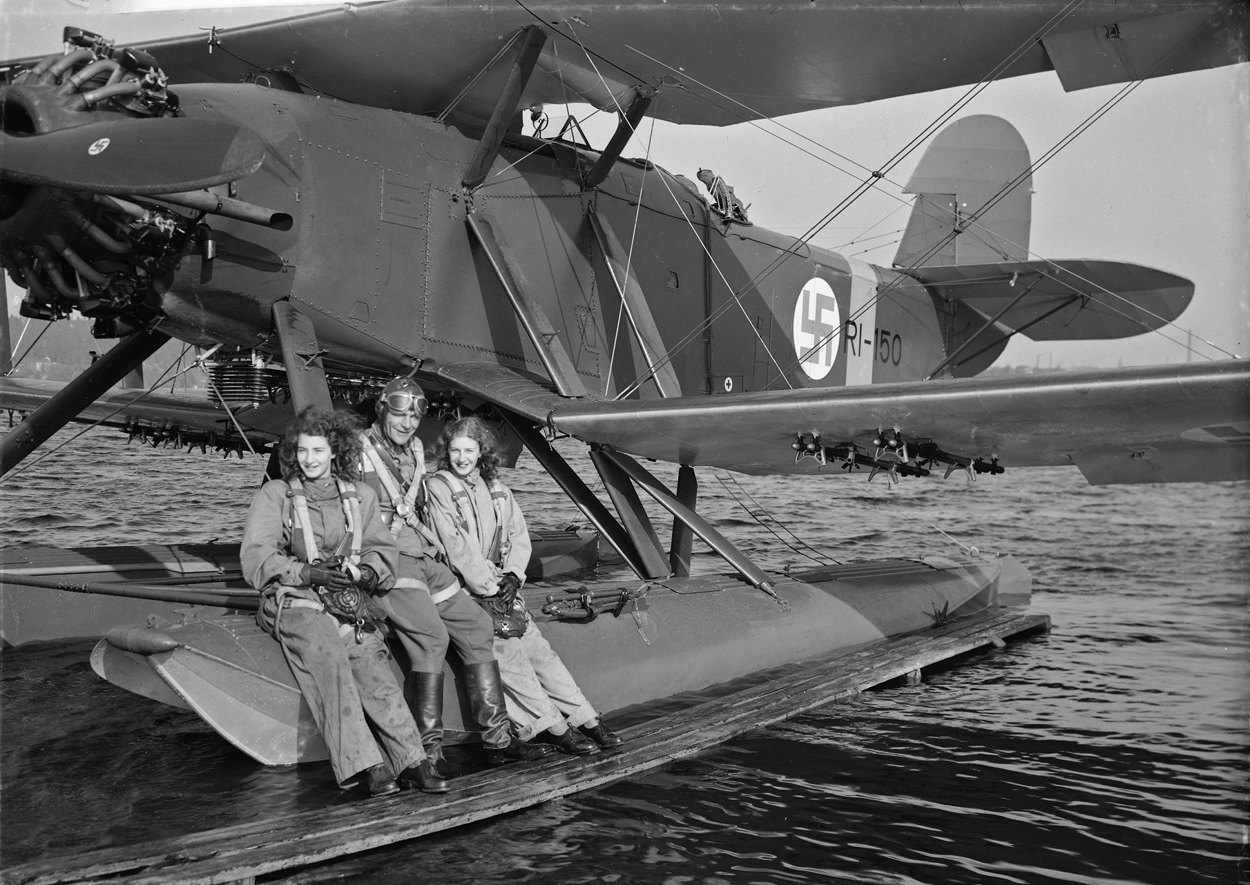 V.L. R.29 Ripon IIF RI-150 ja koelentäjä W.O.A. Siltavuori seuralaisineen Härmälässä syyskuussa 1941.